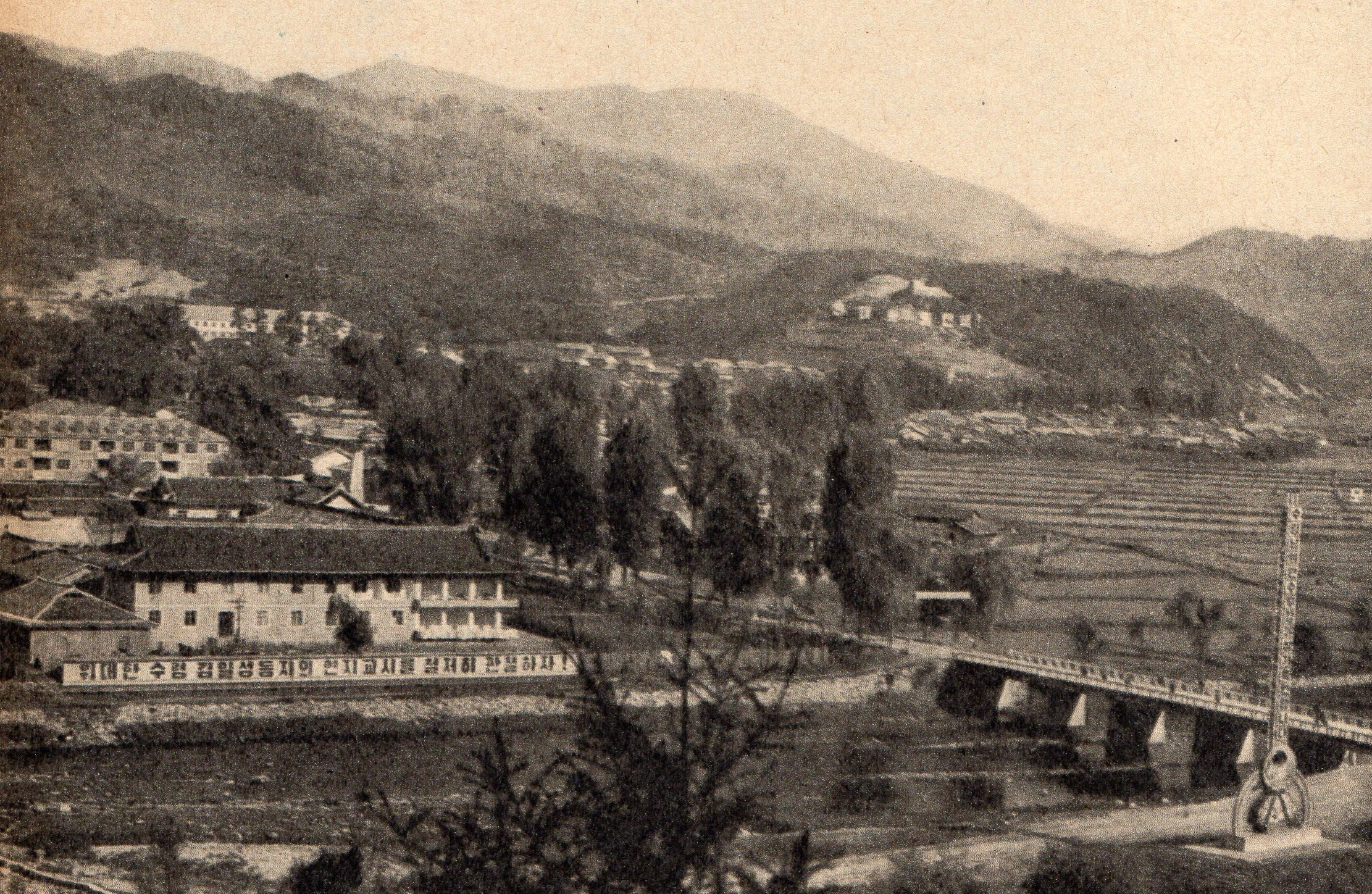 Czhongsong, lata 70. XX w. (Korea Północna).